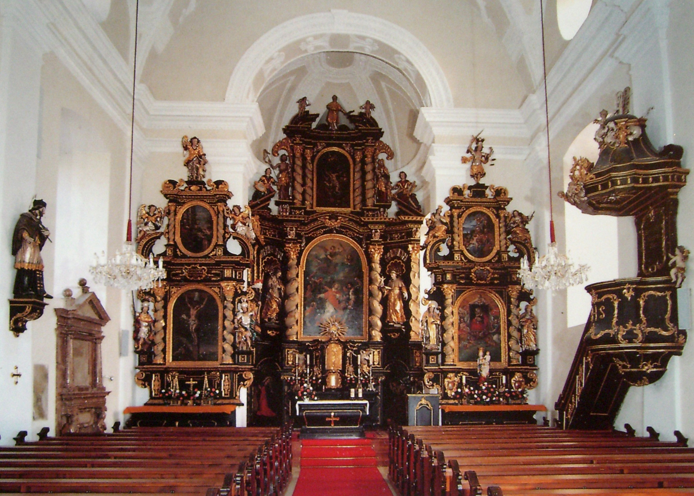 Innenansicht der Pfarrkirche Offenhausen